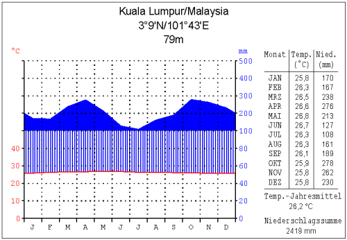 Klimadiagramm Kuala Lumpur